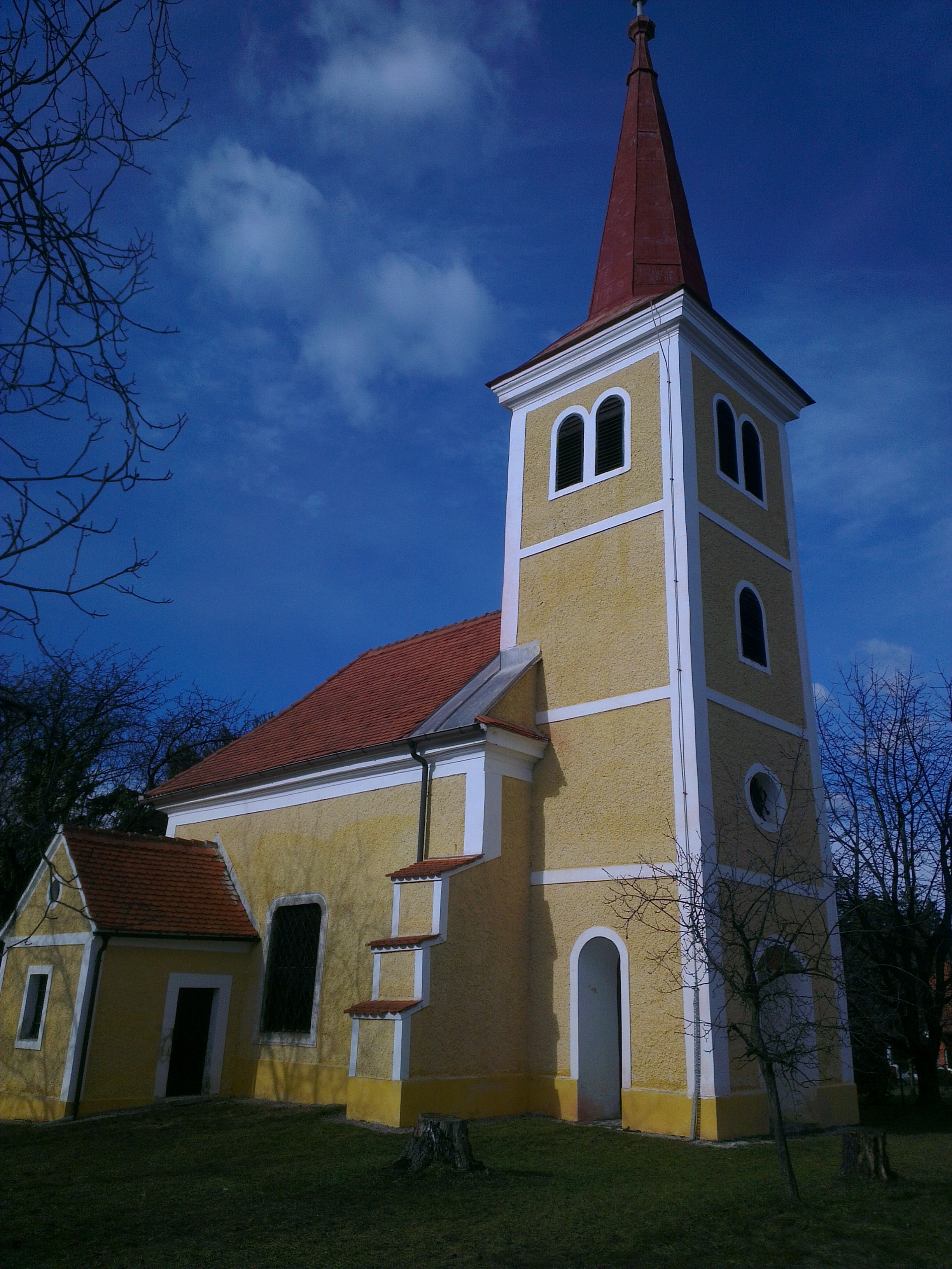 Cerkev Sv. Kriz